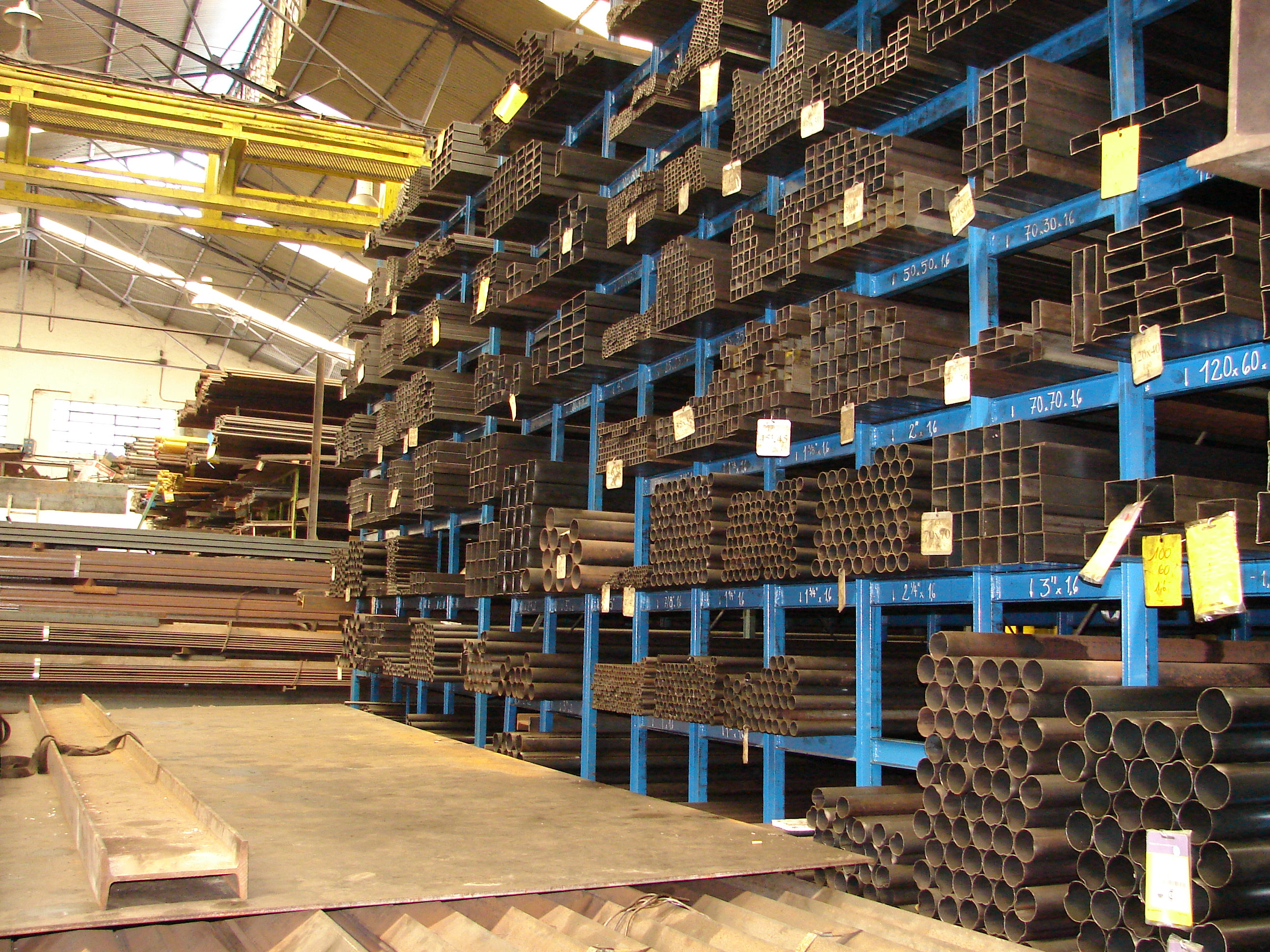 Casa central ubicada en San Martín, Buenos Aires